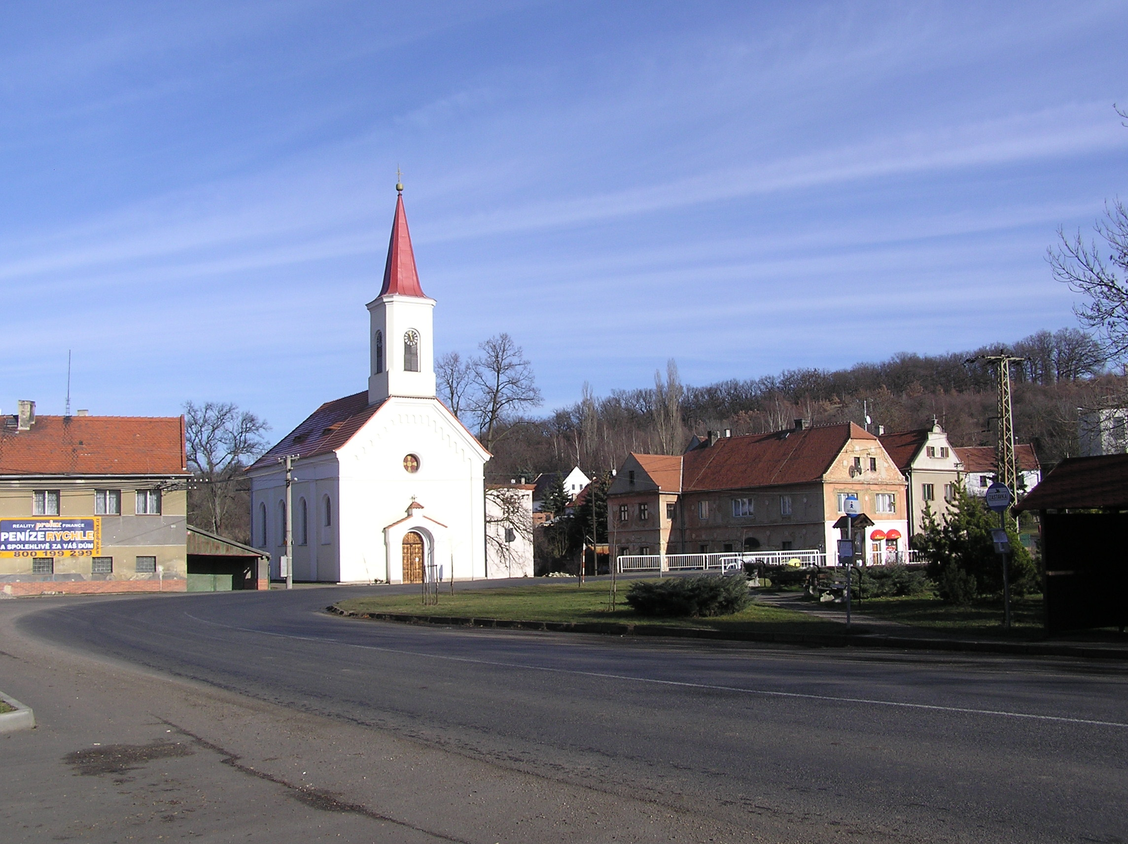 Velemyšleves - náves